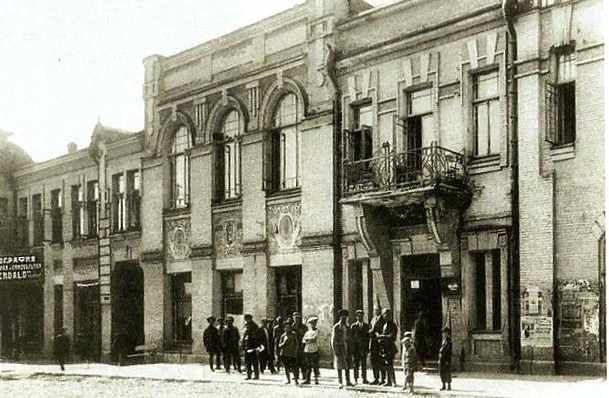 Здание типографии газеты "Сердало" во Владикавказе, 1926 год